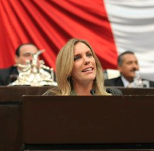 Ninfa Salinas Sada. Abril de 2012.